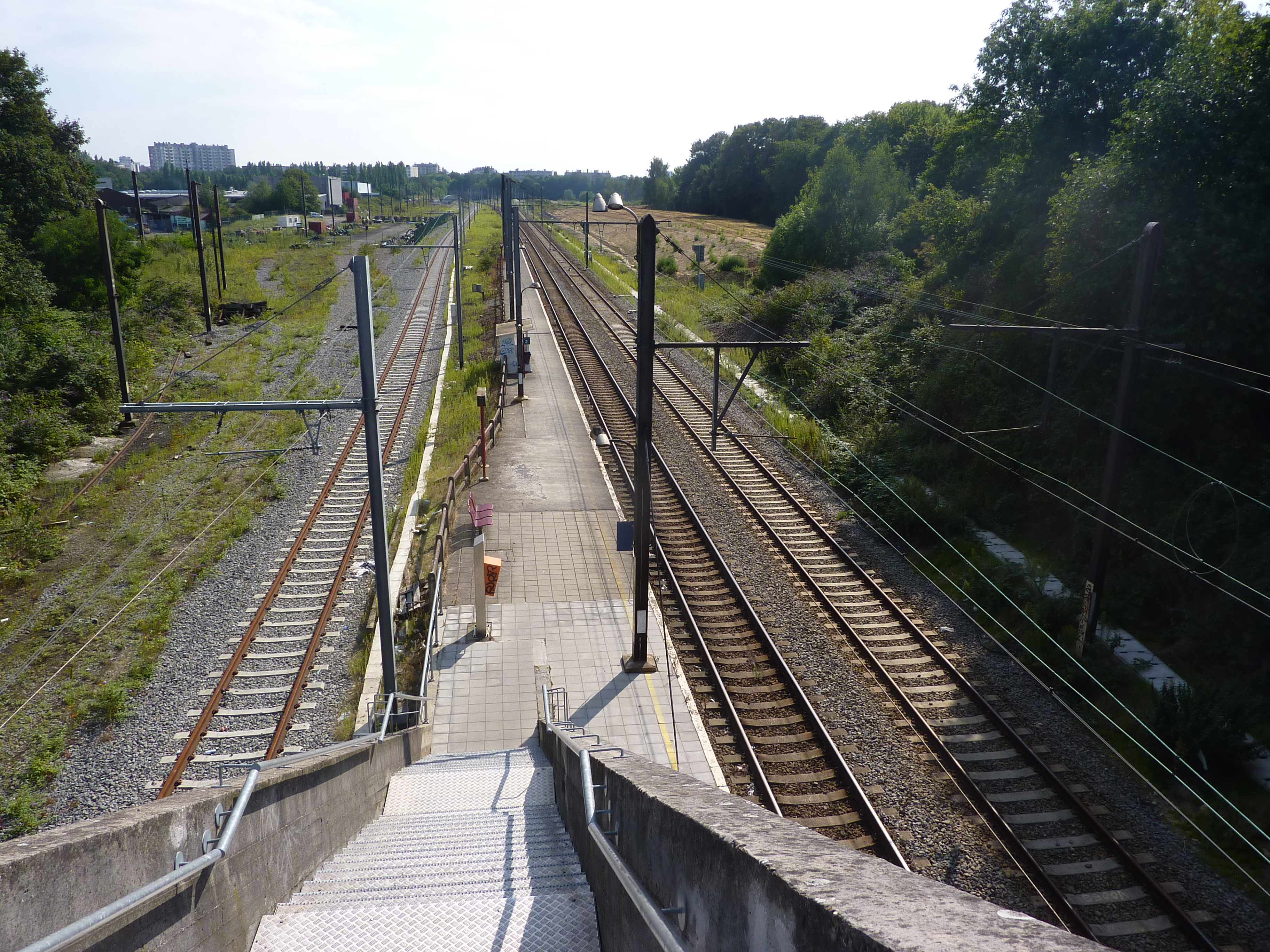 Gare d'Evere, Bruxelles, Belgique.